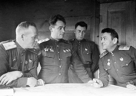 Накануне битвы за Днепр. Слева направо: член военного совета генерал-майор В.М. Оленин, командующий 60-й армией генерал-лейтенант И.Д. Черняховский и начальник штаба генерал-майор Г.А. Тер-Гаспарян. 1943 г.